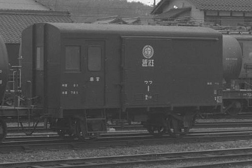 Wafu-1 of Oumi-Tetudou(近江鉄道 ワフ1 有蓋緩急車)